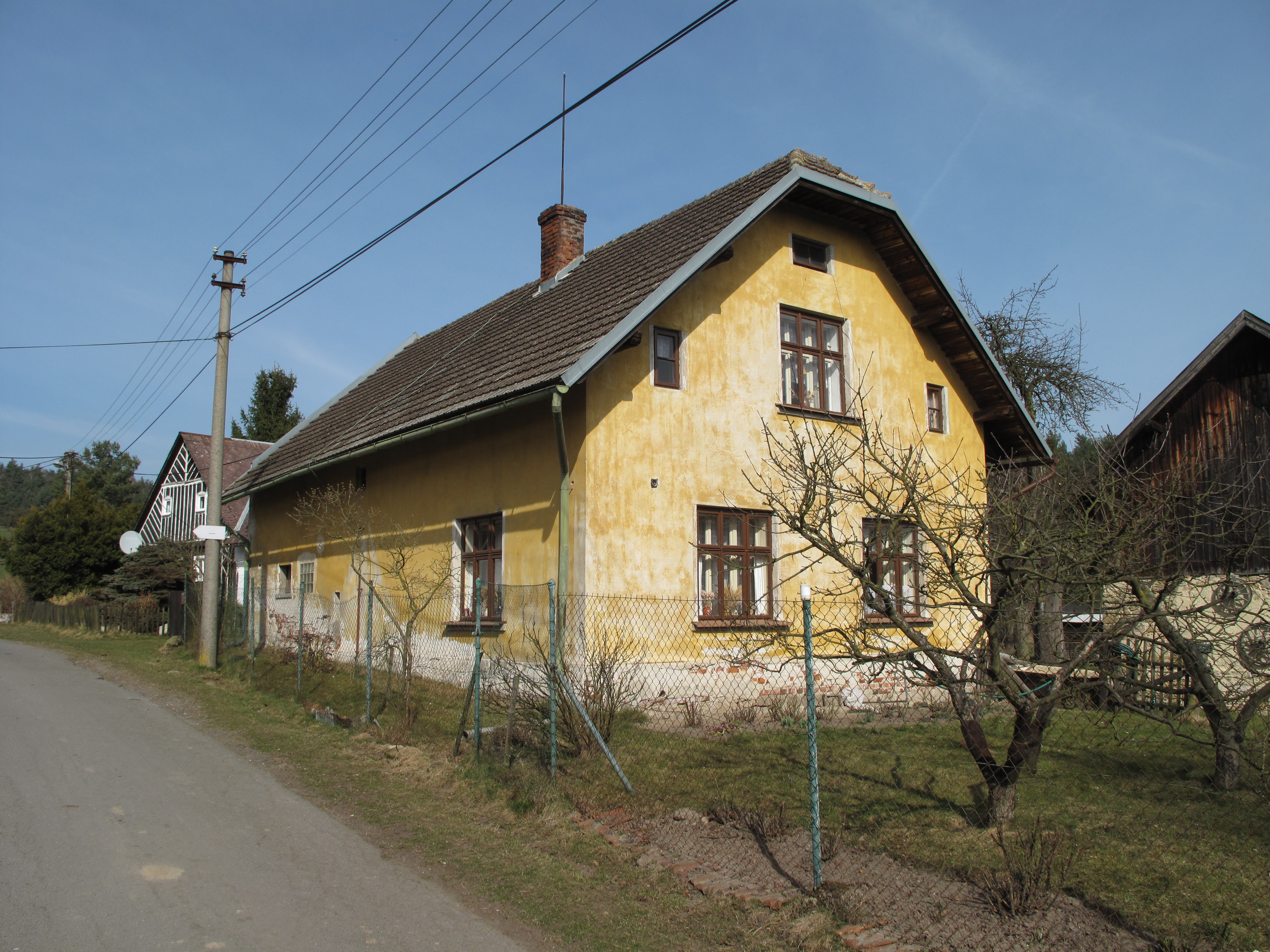 Dům v Hrubém Lesnově. Okres Liberec, Česká republika.